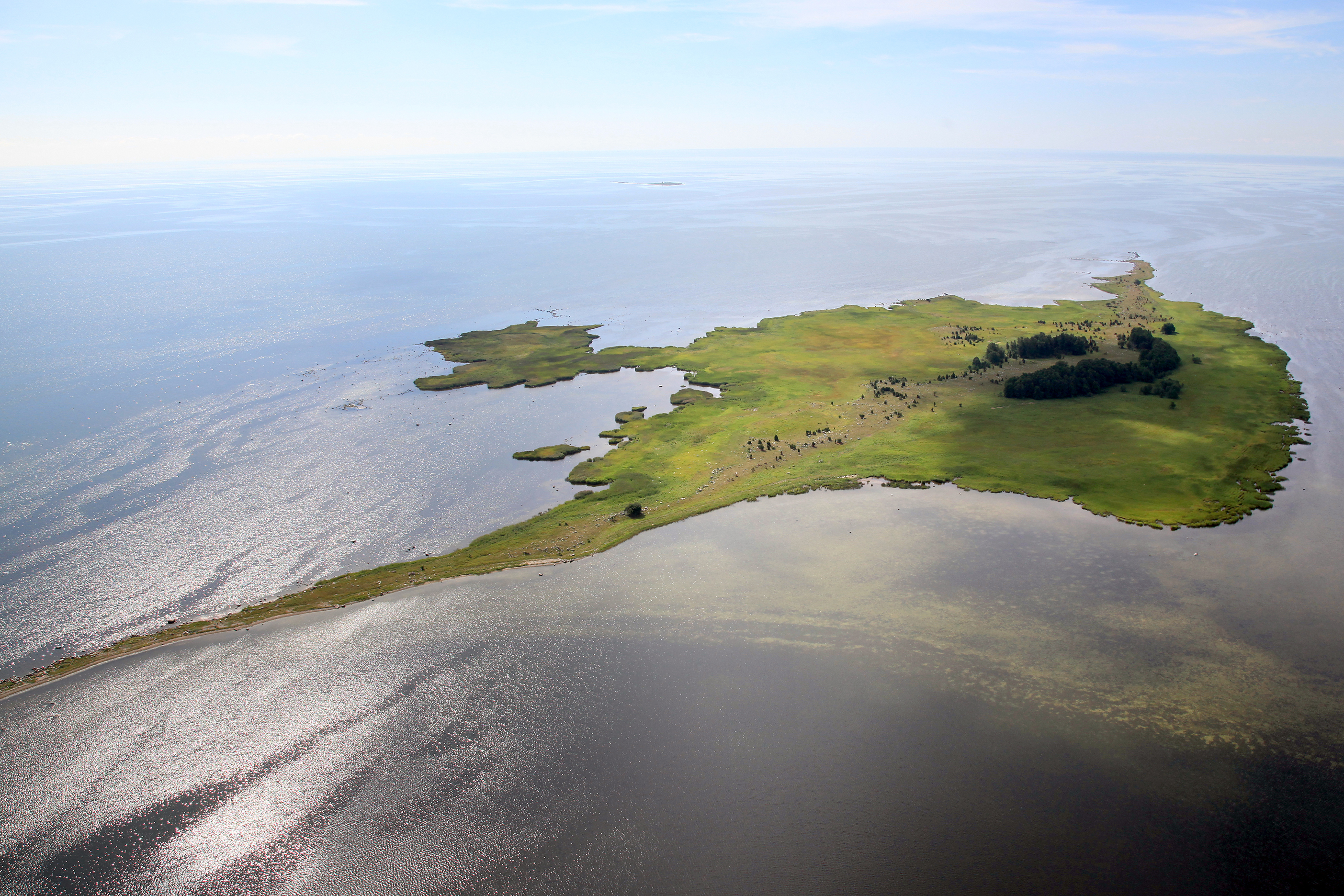 Kasselaid aerofoto